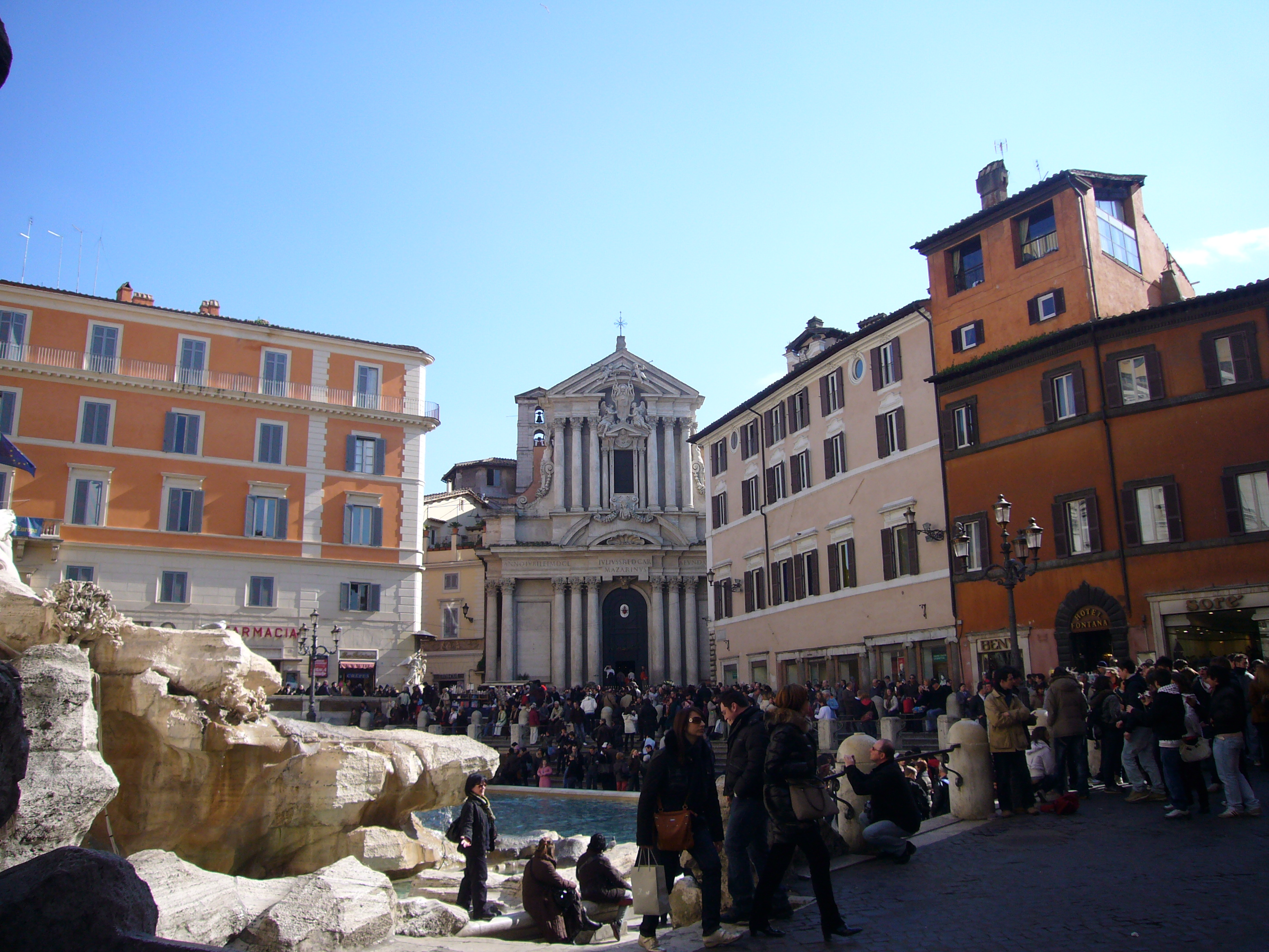 Roma, piazza di Trevi e chiesa dei santi Vincenzo e Anastasio